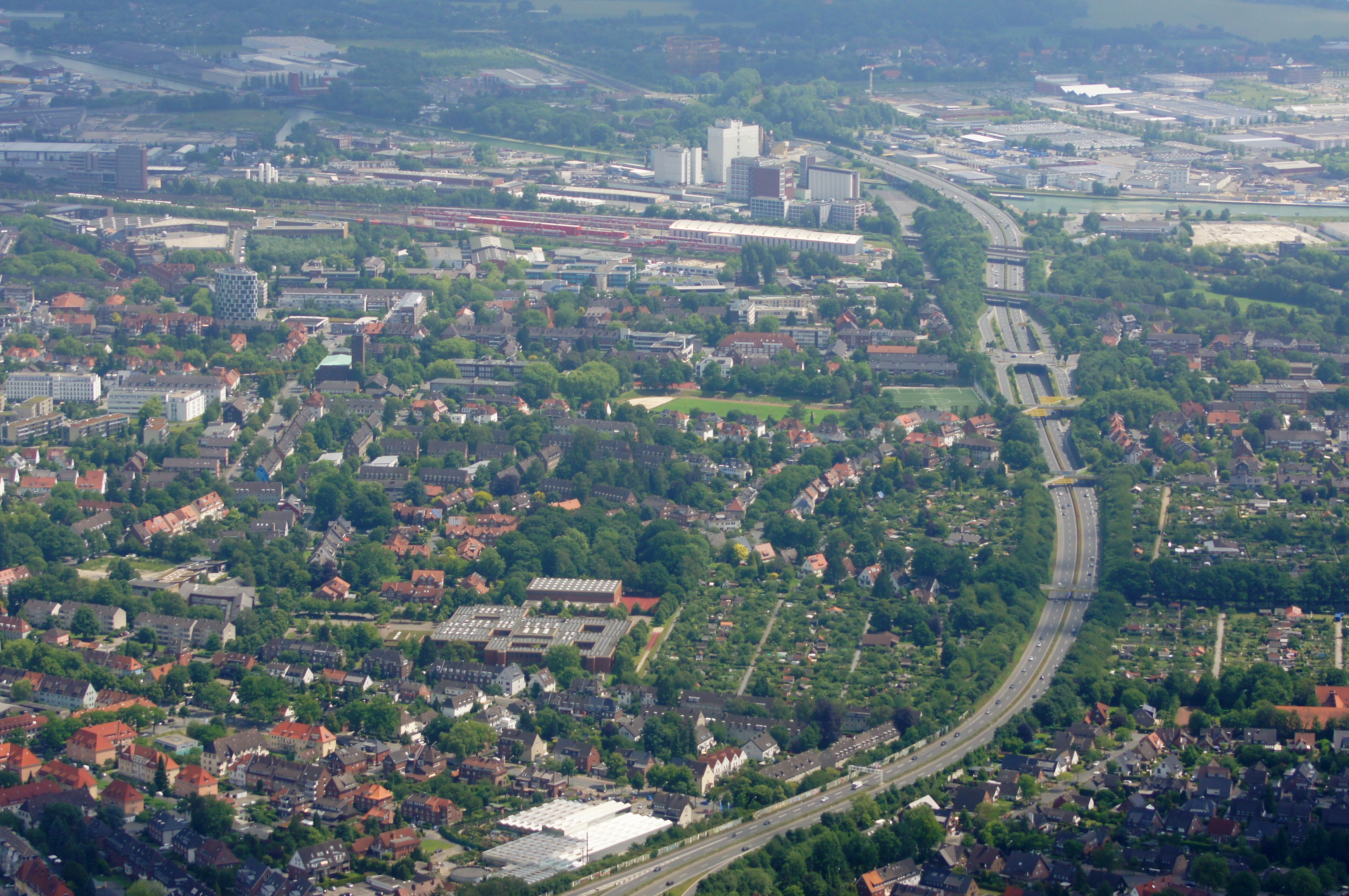 Umgehungsstraße B51 im Süden von Münster, Nordrhein-Westfalen, Deutschland. Das Foto entstand während des Münsterland-Fotoflugs am 1. Juni 2014. Hinweis: Die Aufnahme wurde aus dem Flugzeug durch eine Glasscheibe hindurch fotografiert.